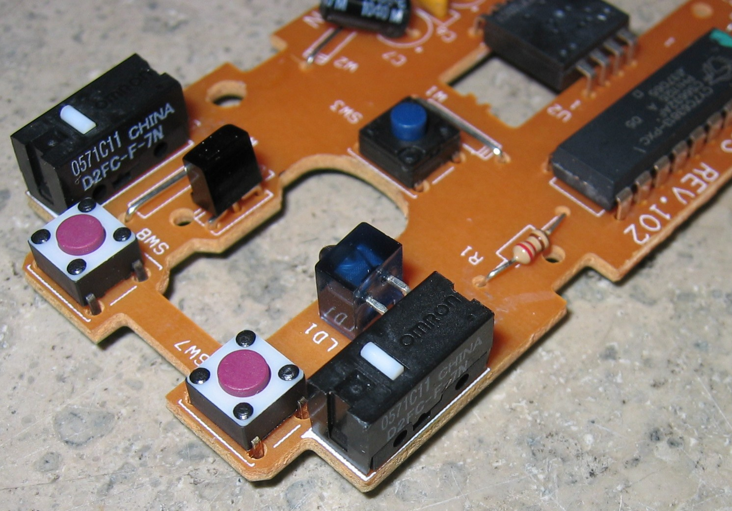 Leiterplatte einer defekten optischen Rad-Maus (Bestückungsseite)